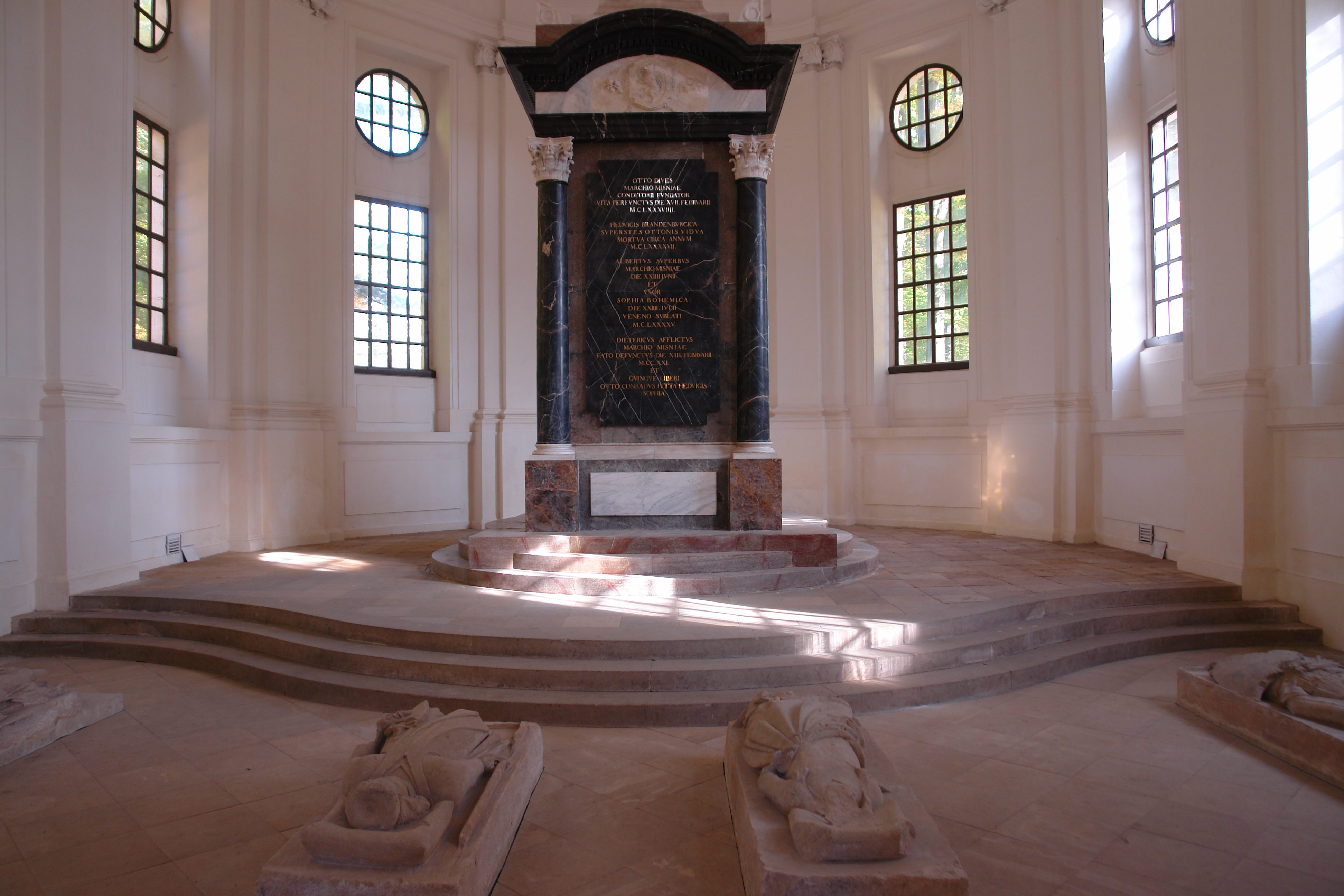 Innenansicht des Mausoleums von Altzella